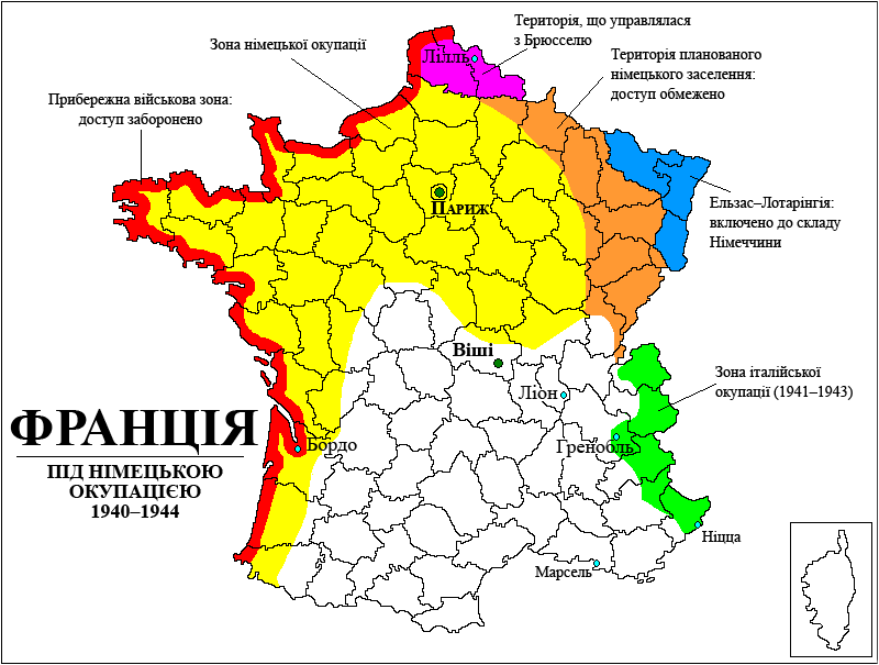 Карта окупованої Франції під час Другої Світової війни